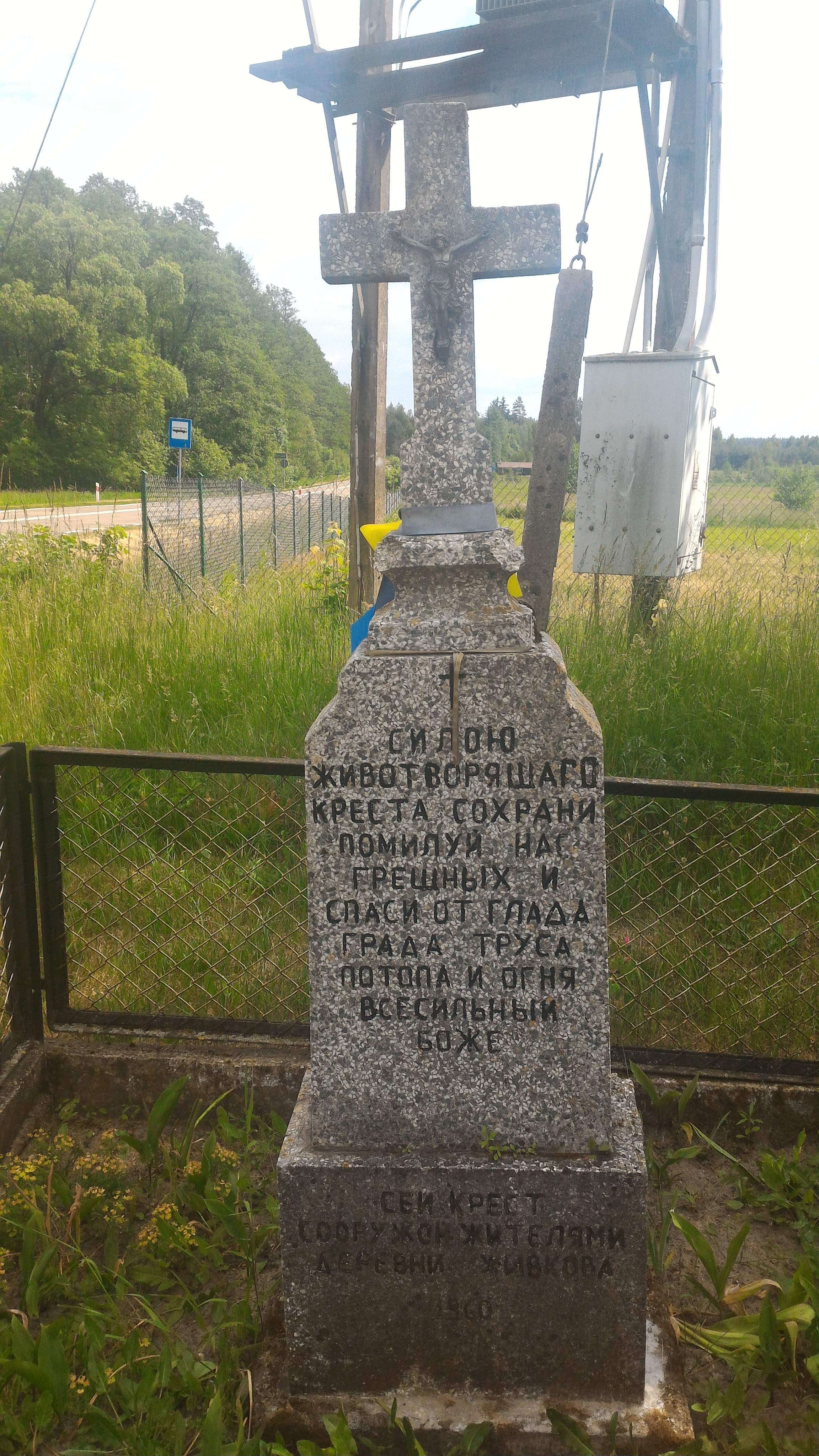 Krzyż wotywny w Żywkowie koło Trześcianki.